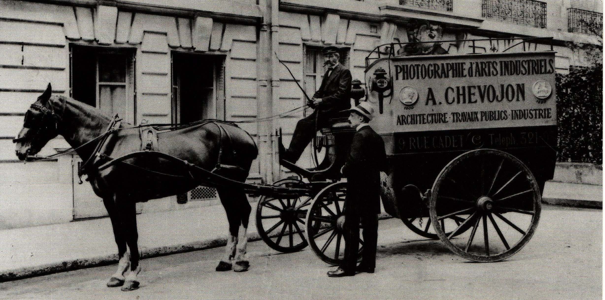 Studio Chevojon créé par Arbert Chevojon (1854-1925)